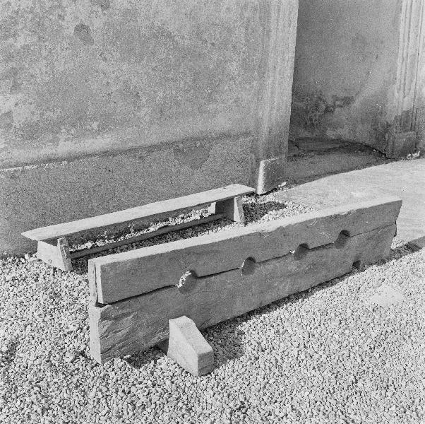 Pliktpall, anskaffad år 1800. Straffstock, 1767. Kategori: (01) Exteriörer, detaljer Pliktpall, anskaffad år 1800. Straffstock, 1767.